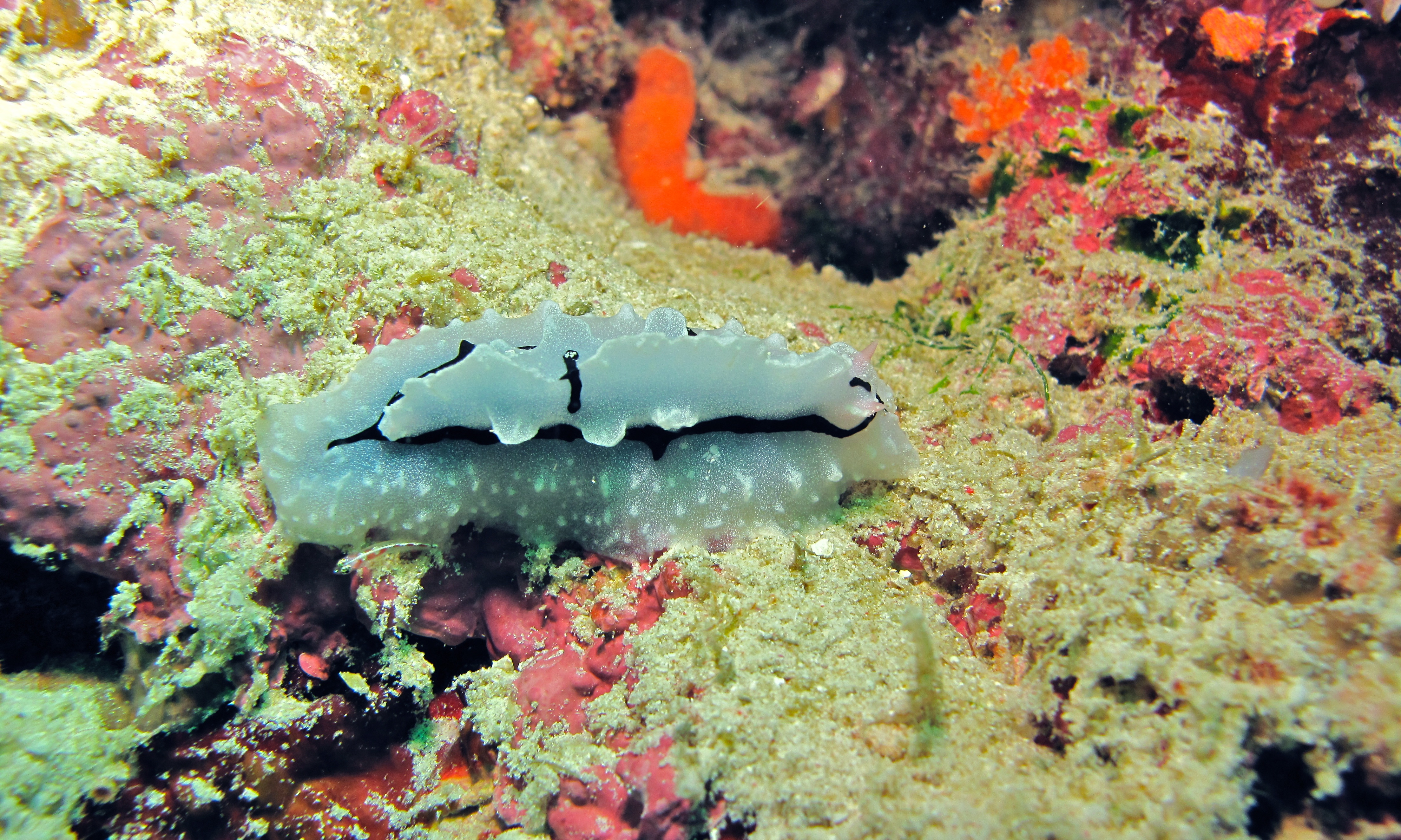 Church Reef, Pulau Sibuan, Sabah, MALAYSIA